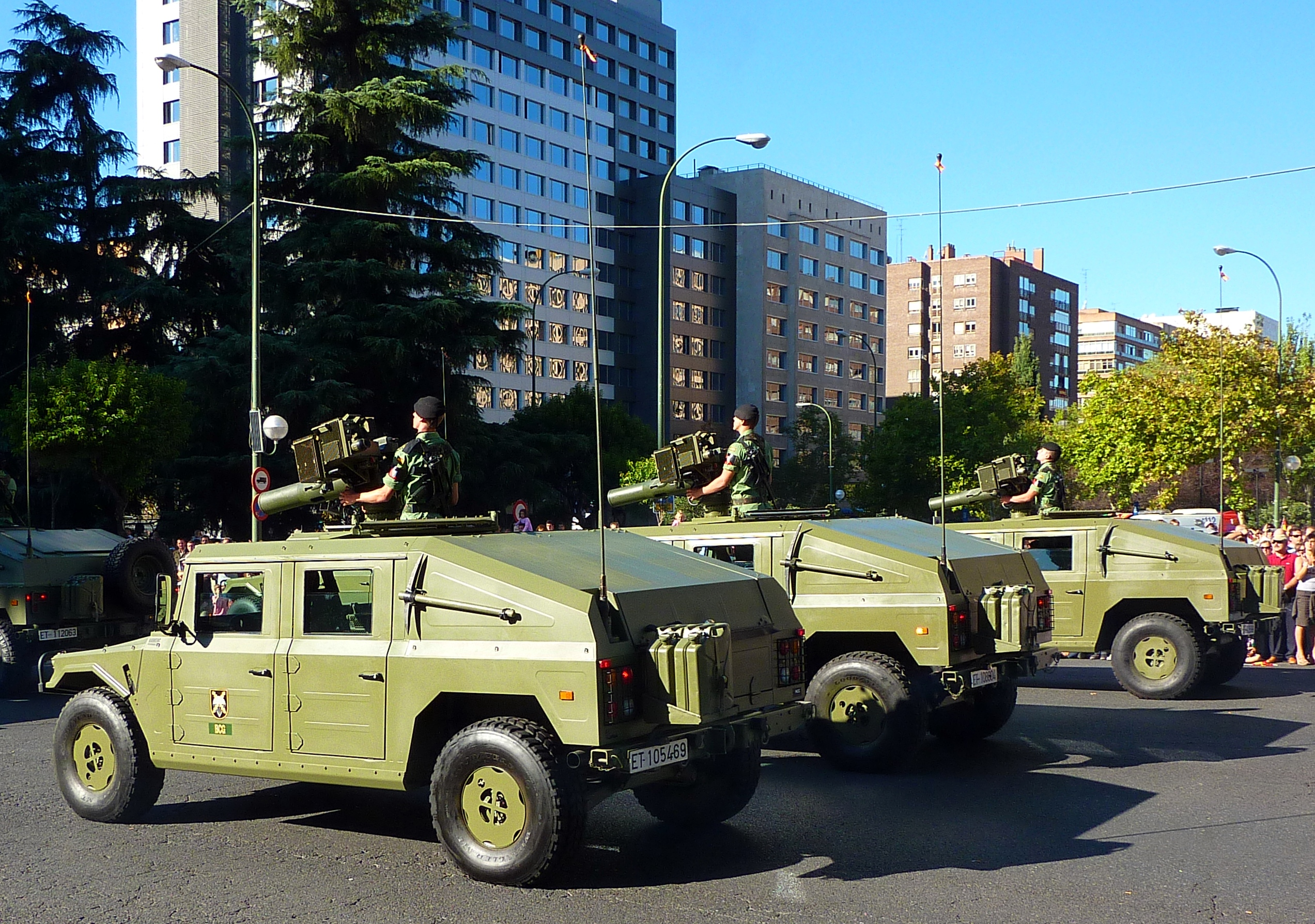 VAMTACs TOW del Ejército Español.